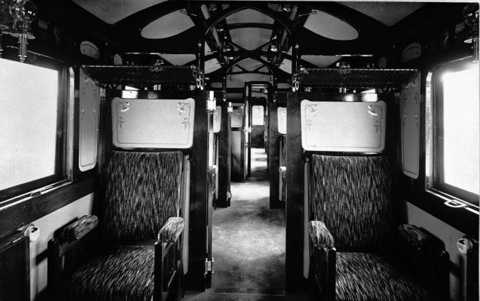 Foto. Interieur van een eerste klas rijtuig van de Deli Spoorweg Maatschappij